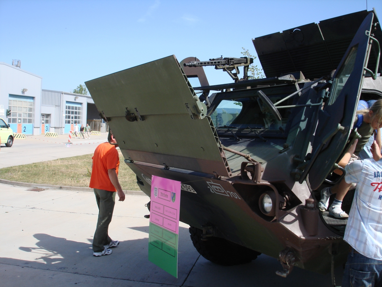 Schwallschild des Transportpanzer 1 Fuchs. Das hydraulisch aufklappbare Schild wird während der Wasserfahrt eingesetzt um den Auftrieb des Fahrzeuges zu erhöhen und den Widerstand im Wasser zu reduzieren. Ebenfalls zu sehen das MG3 auf Freirichtlafette.